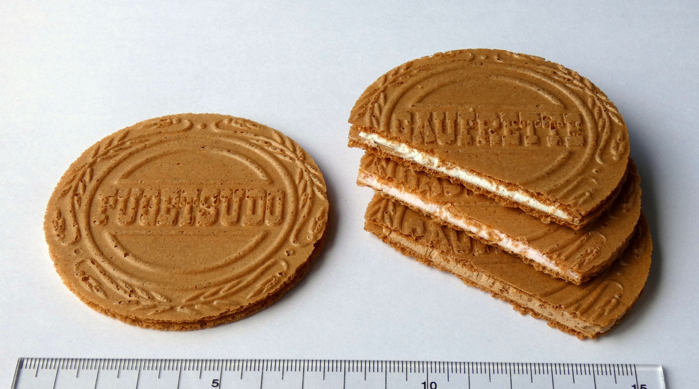 東京風月堂 ゴーフレット（ミニサイズ）（右側、上から、バニラ、ストロベリー、チョコレート）（1枚45円）